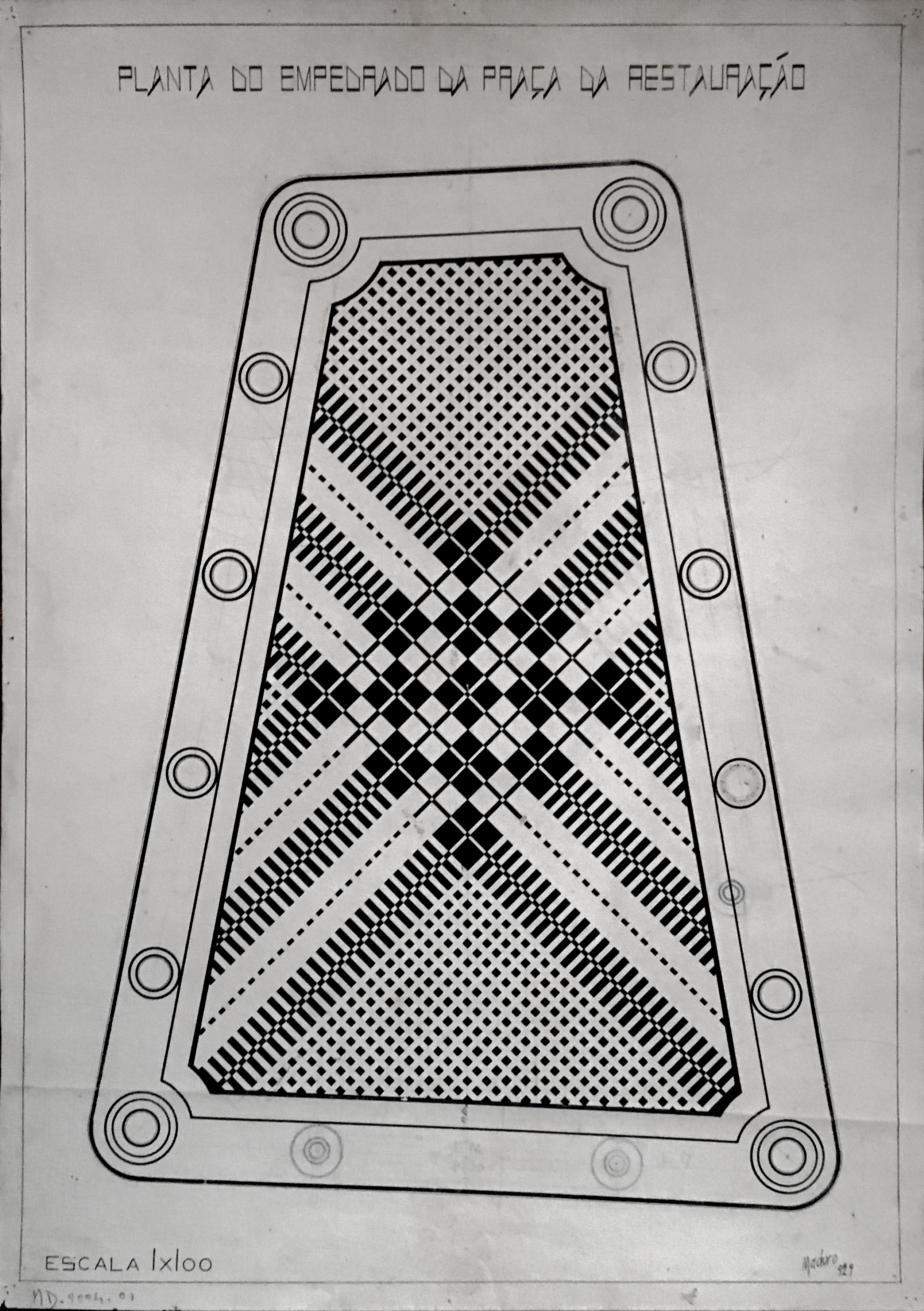 Planta (projecto) do Empedrado da Praça da Restauração ("Praça Velha") de Angra do Heroísmo, pelo artista Francisco Coelho Maduro Dias.